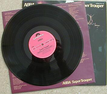 Das Bild stammt von mir, es zeigt die ABBA-LP "Super Trouper" mit Inlay und Hülle. Ich stelle es im Rahmen der GNU FDL der Wikipedia zur Verfügung.